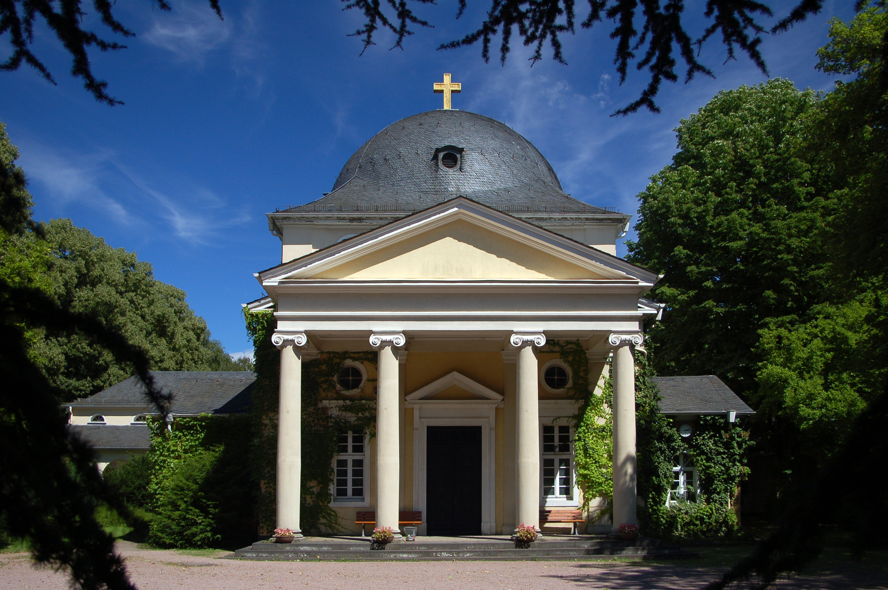 Trauerhalle des Friedhofs Frankfurt-Höchst